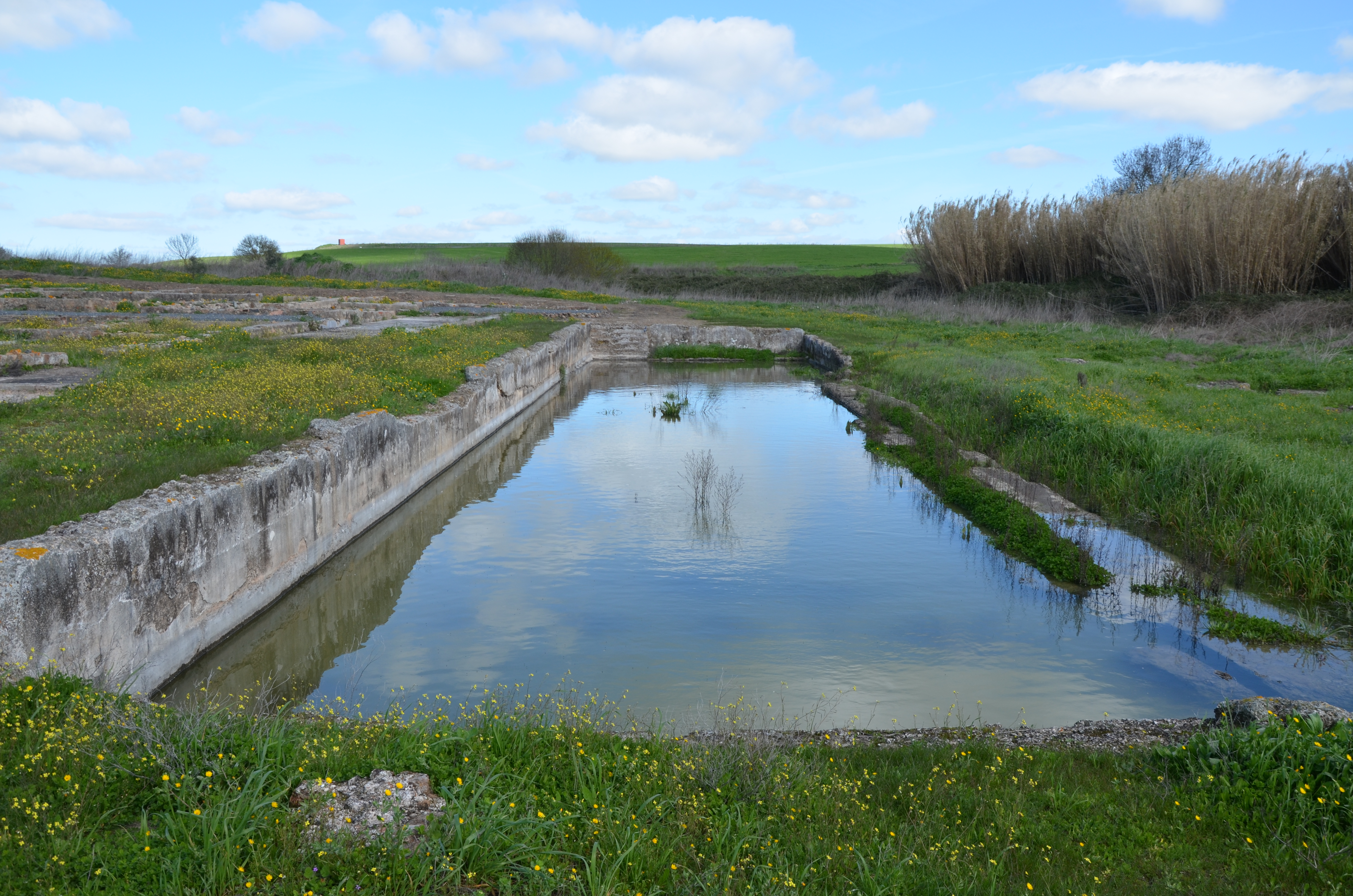 Roman Villa of Pisões, Portugal Roman villa, Pisões